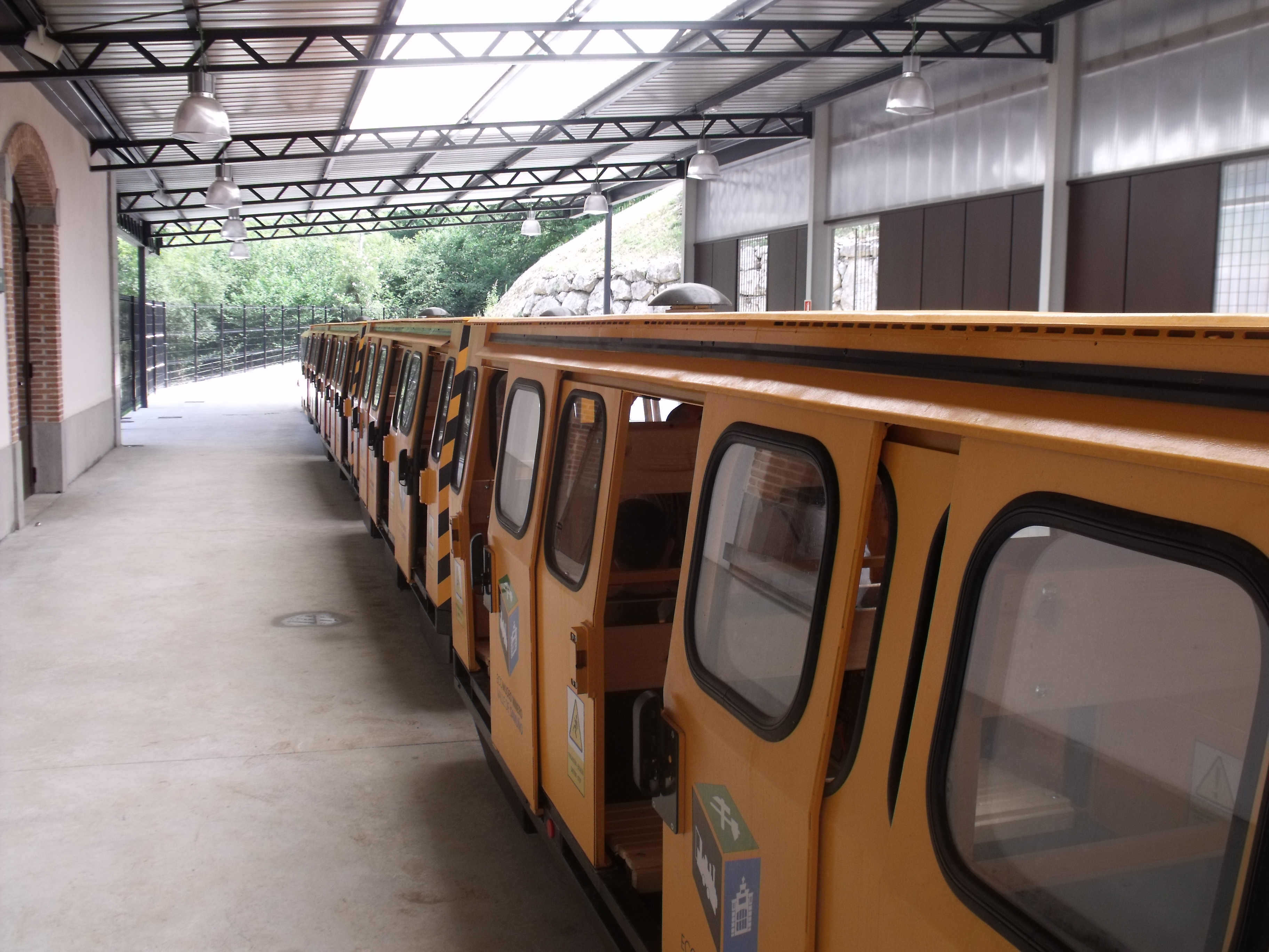 Ecomuseo del Valle del Samuño.